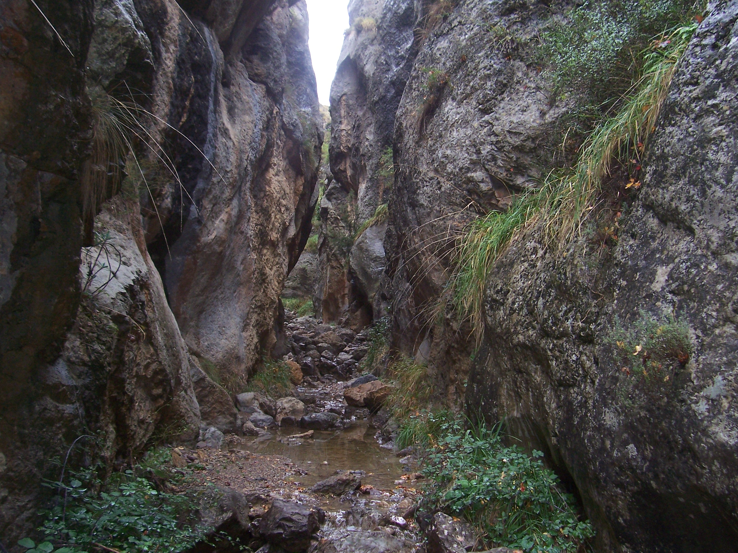 Tramo del Barranco de Valcongosto de Purujosa en otoño.